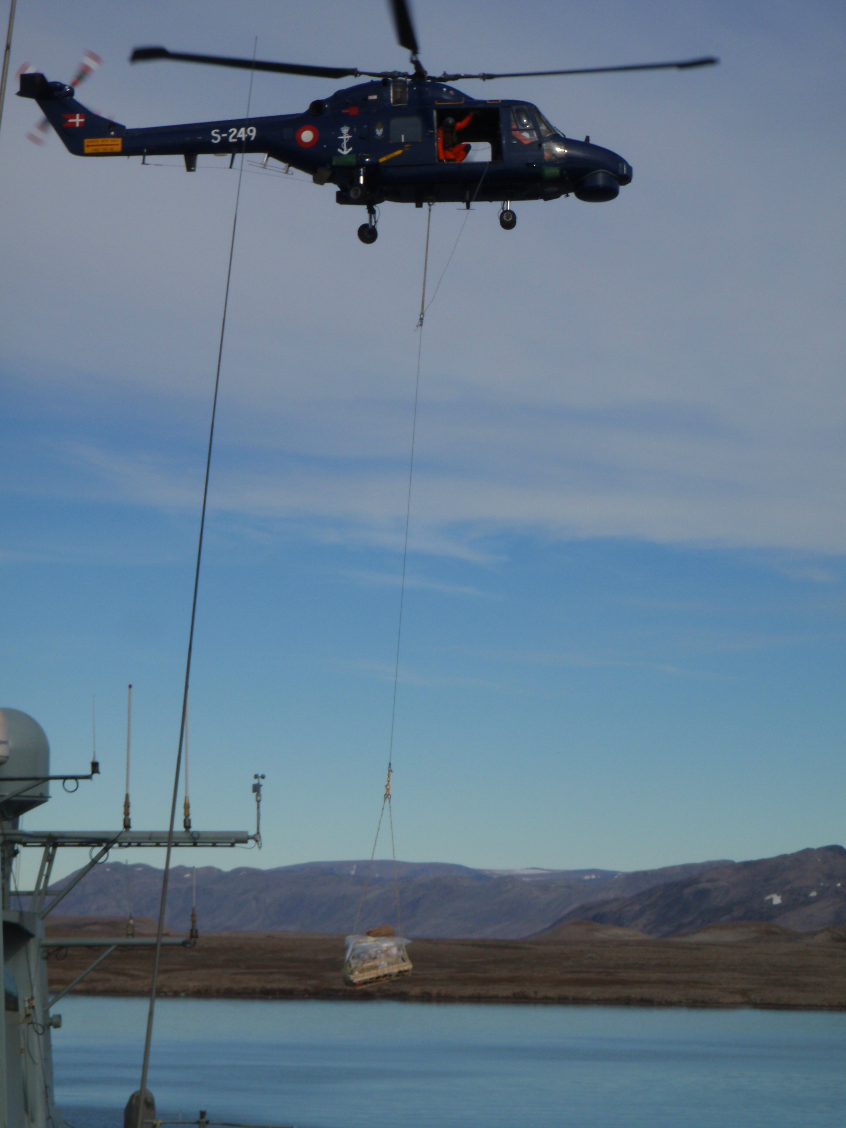 Westland Lynx med sling over Inspektionsskibet VÆDDEREN 2008